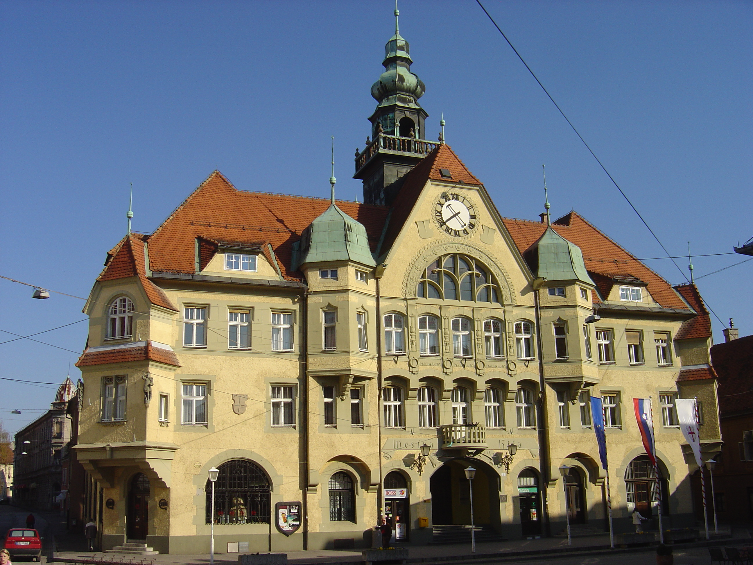 Ptuj, Slovenia